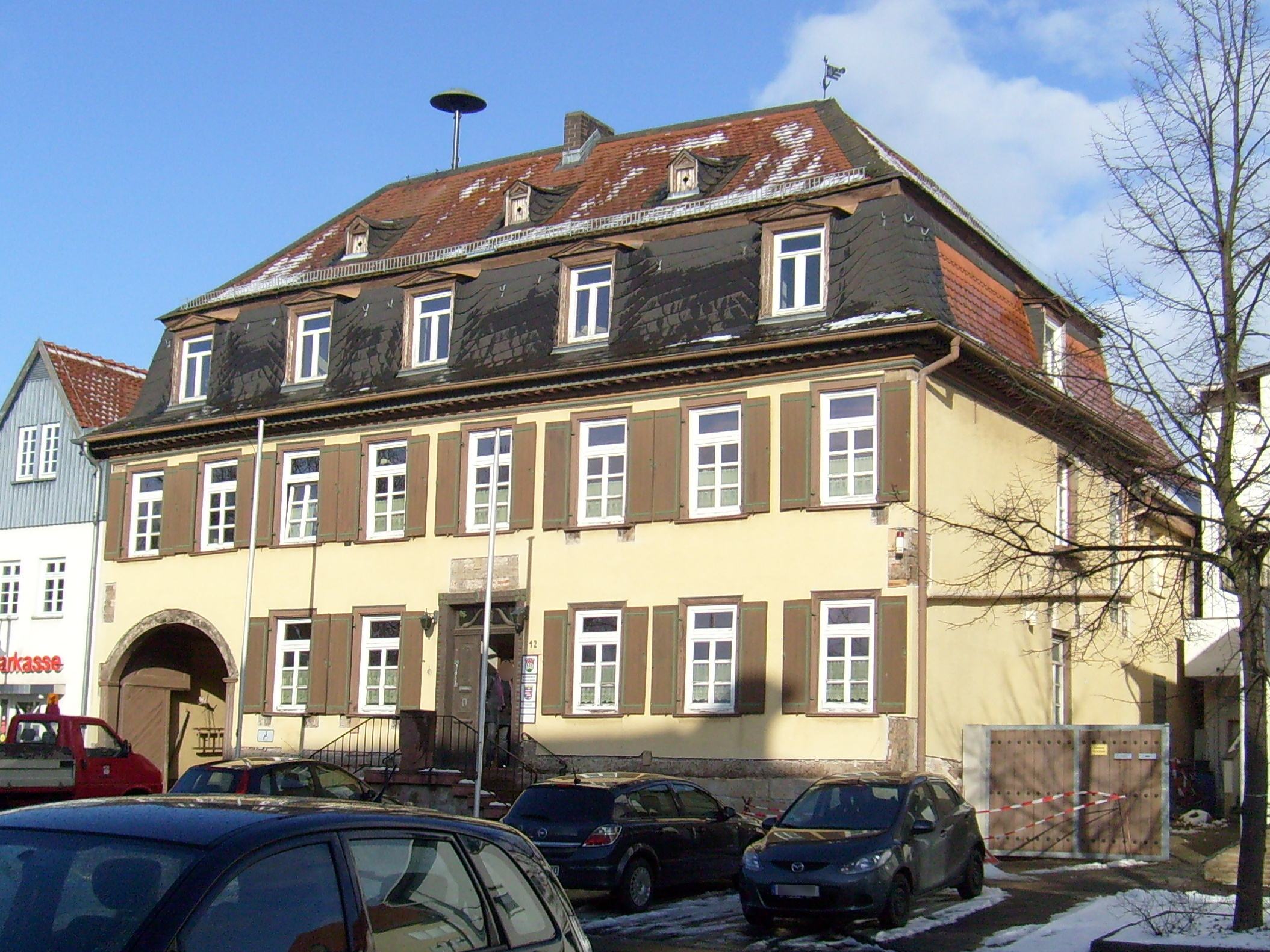 Rathaus Rockenberg